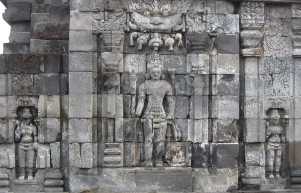 ペルワラのレリーフ